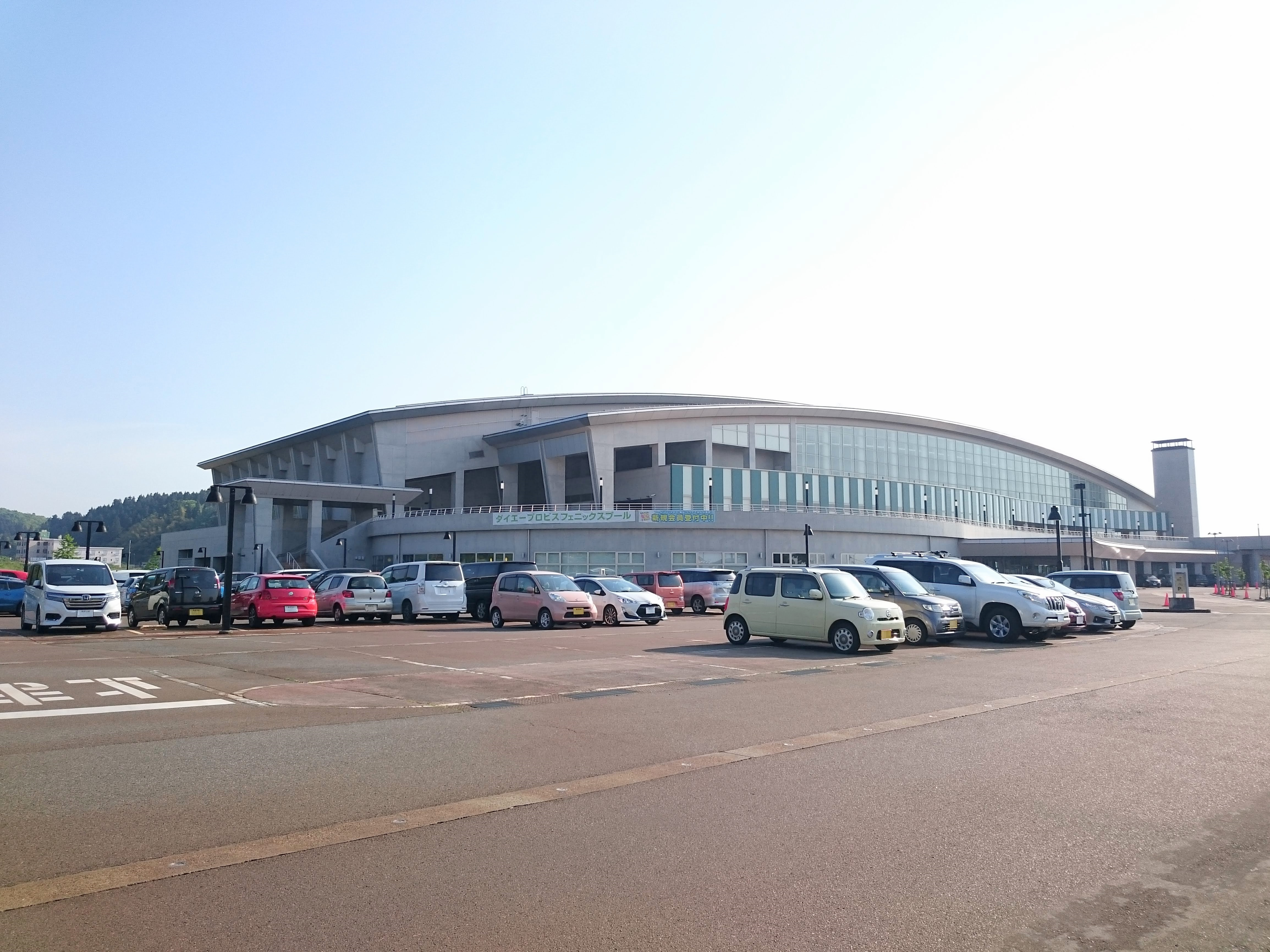 ダイエープロビスフェニックスプールの外観